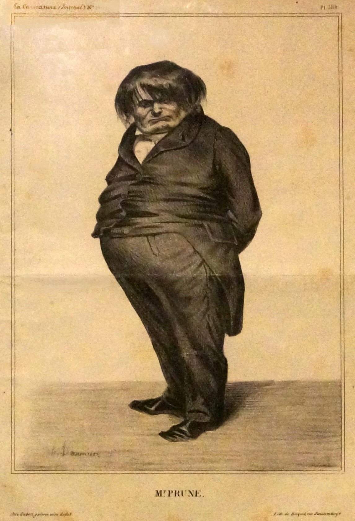 présenté au Musée de la Franc-Maçonnerie.